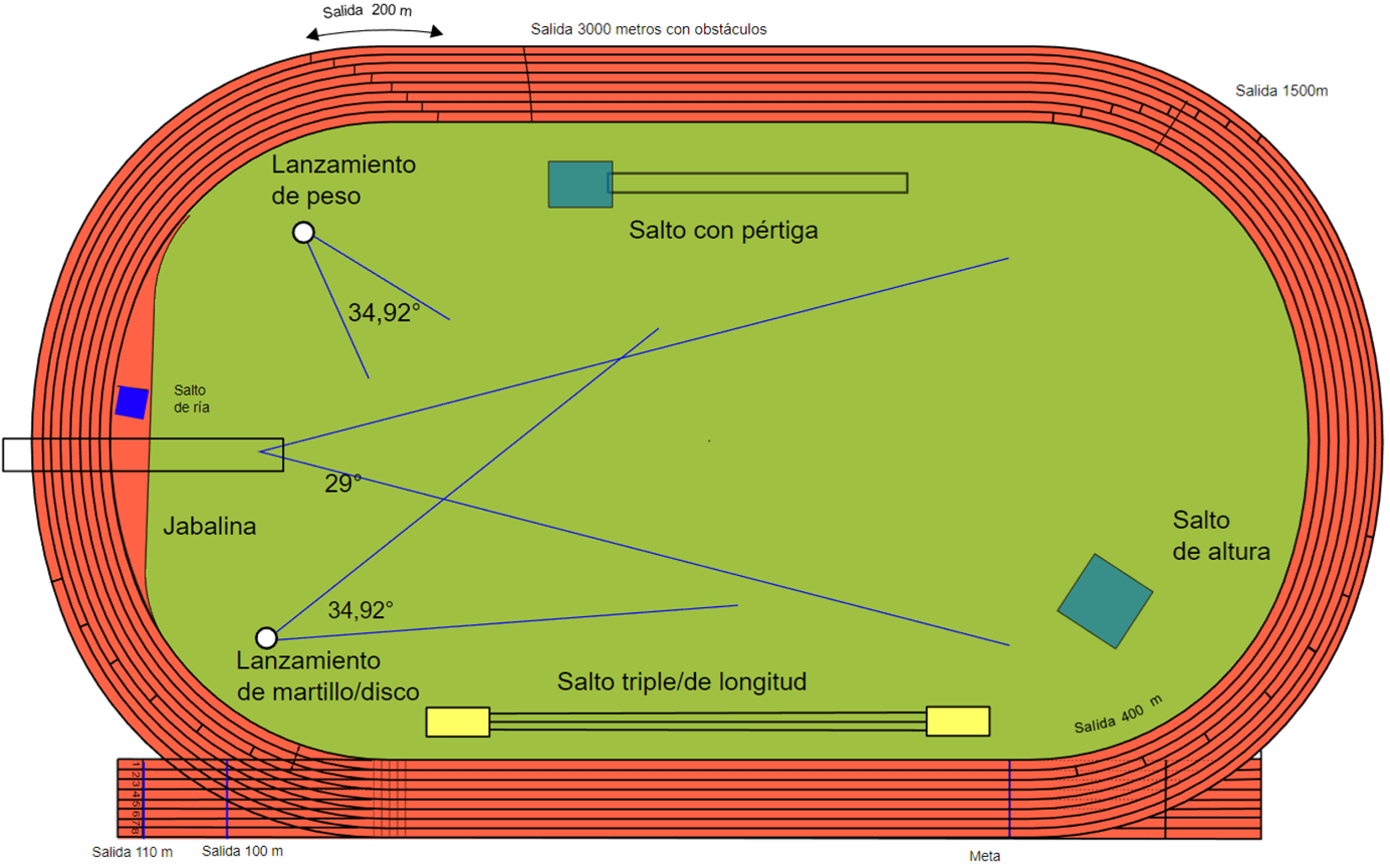 Pista de juego